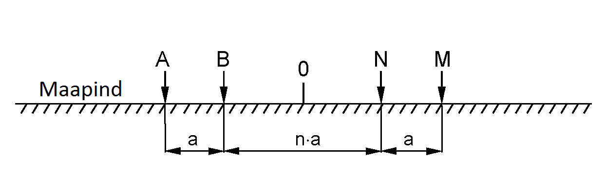 Dipool-dipool elektroodkonfiguratsioon